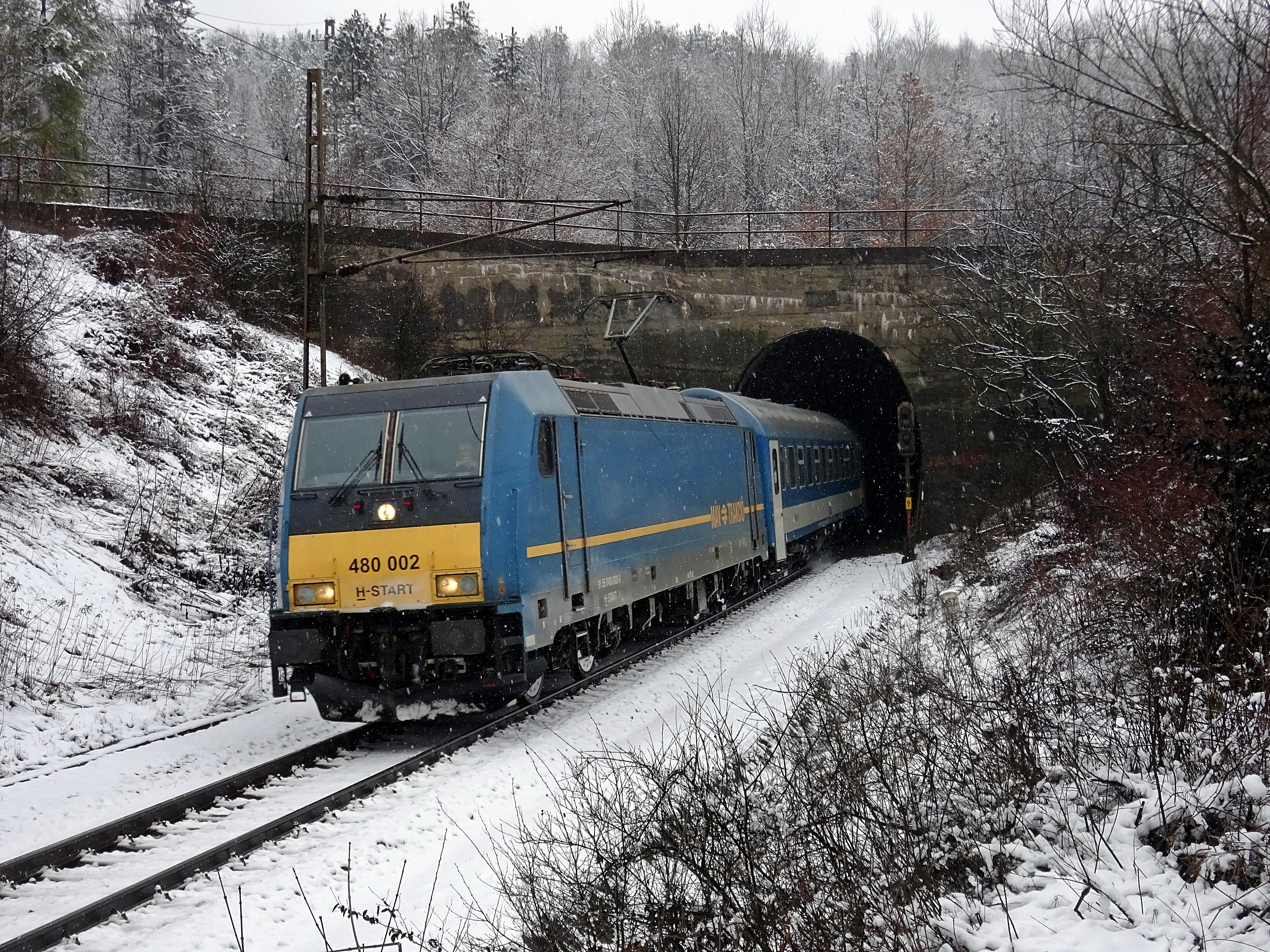 A 2-es Traxx a Dráva InterCity-vel halad Pécs felé az abaligeti alagútnál.